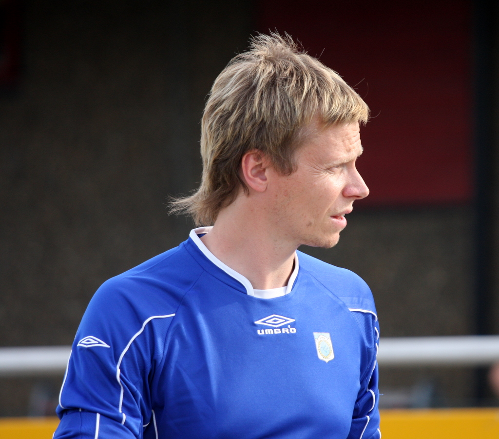 Morten Pedersen